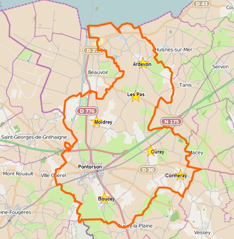 Carte openStreetMap de la commune avec ses communes asscoiées